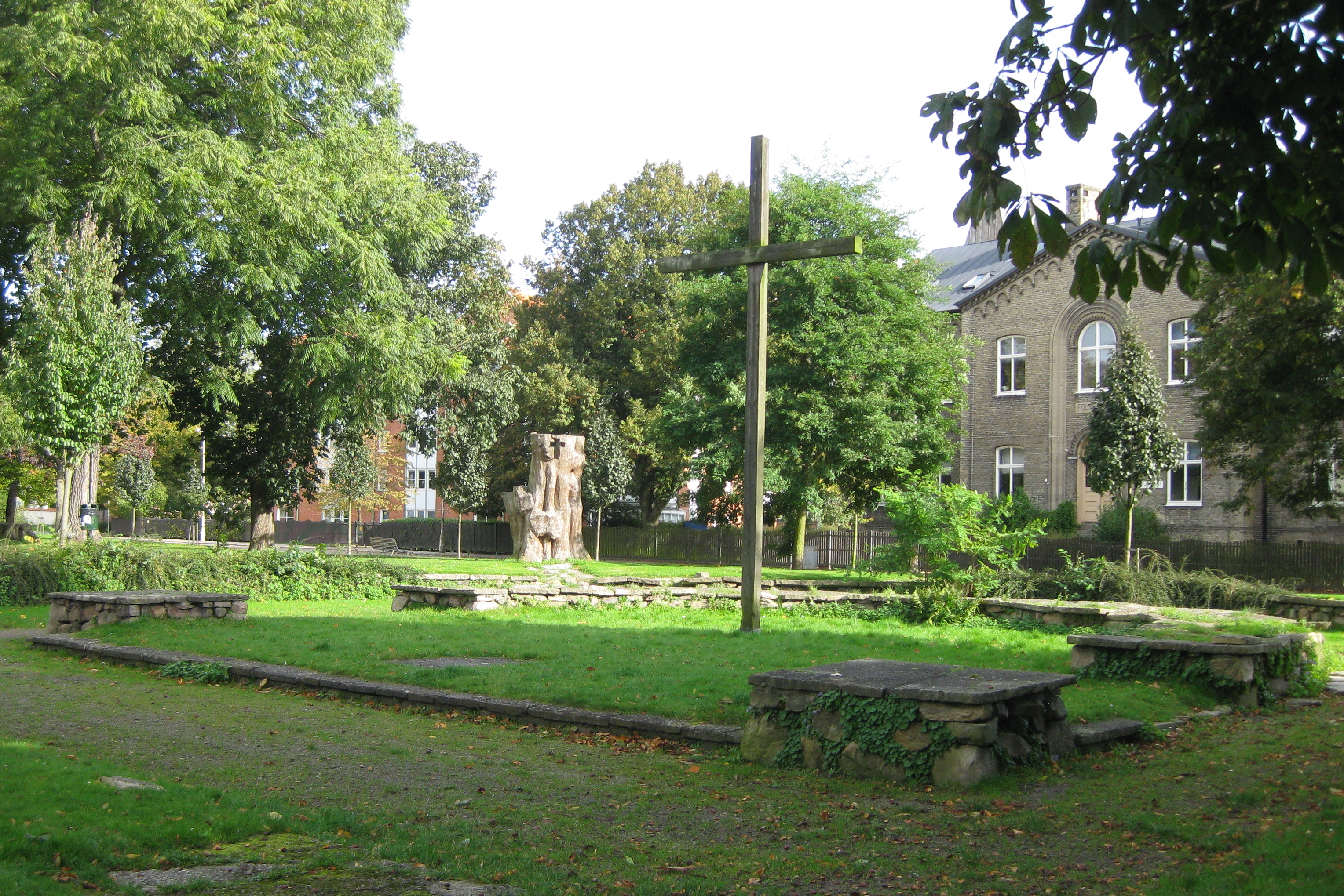 Ruinerna efter Sankt Johannis Babtistae, Landskronas första kyrka, i stadsparken.